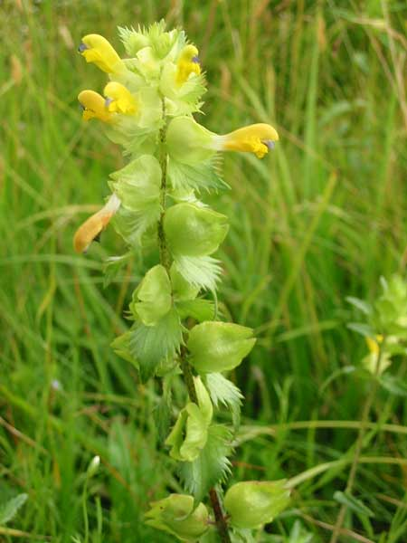 Grote Ratelaar (Rhinanthus angustifolius), Lendevallei 28 juni 2003, eigen foto